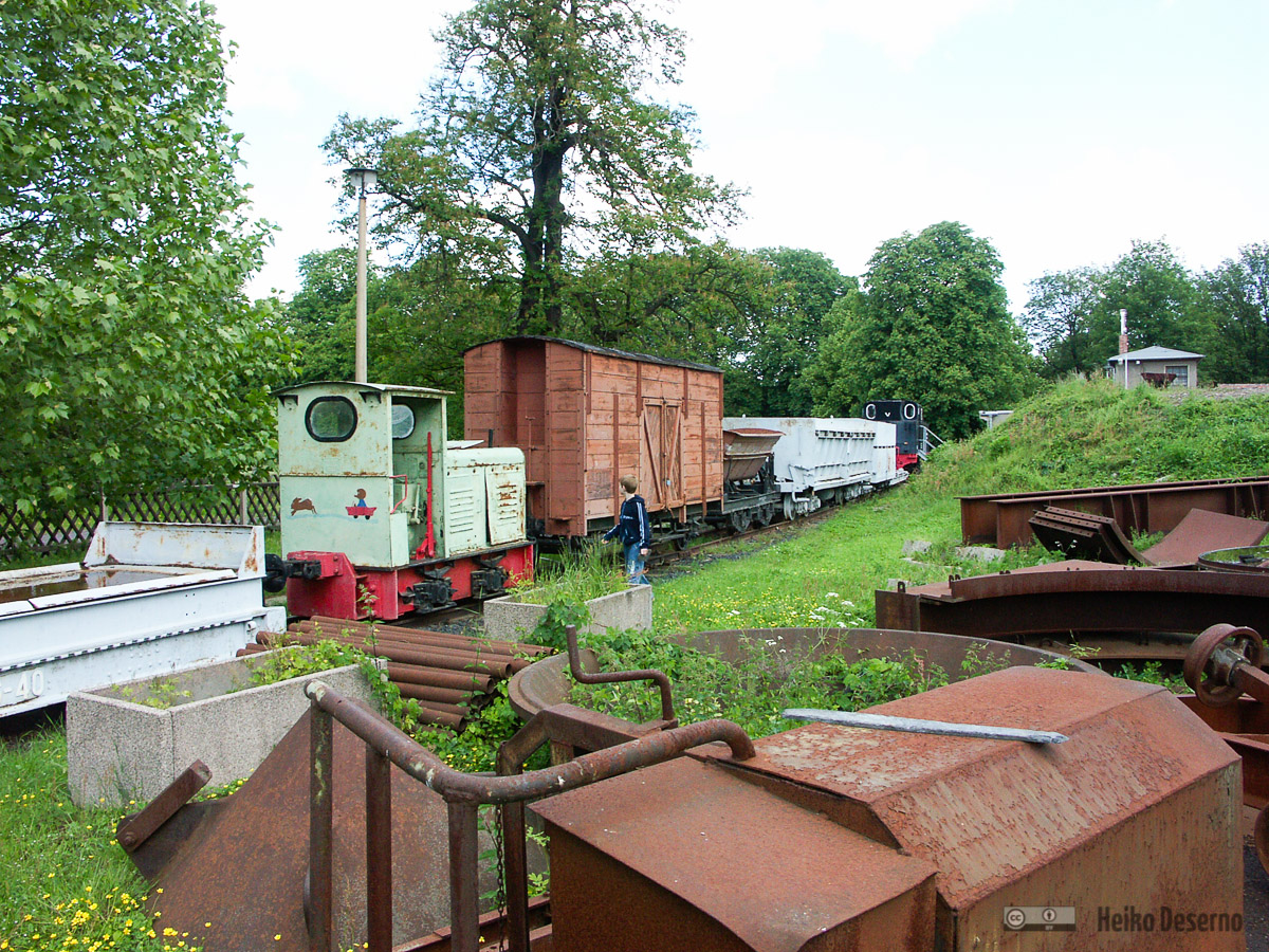 fb24img-013